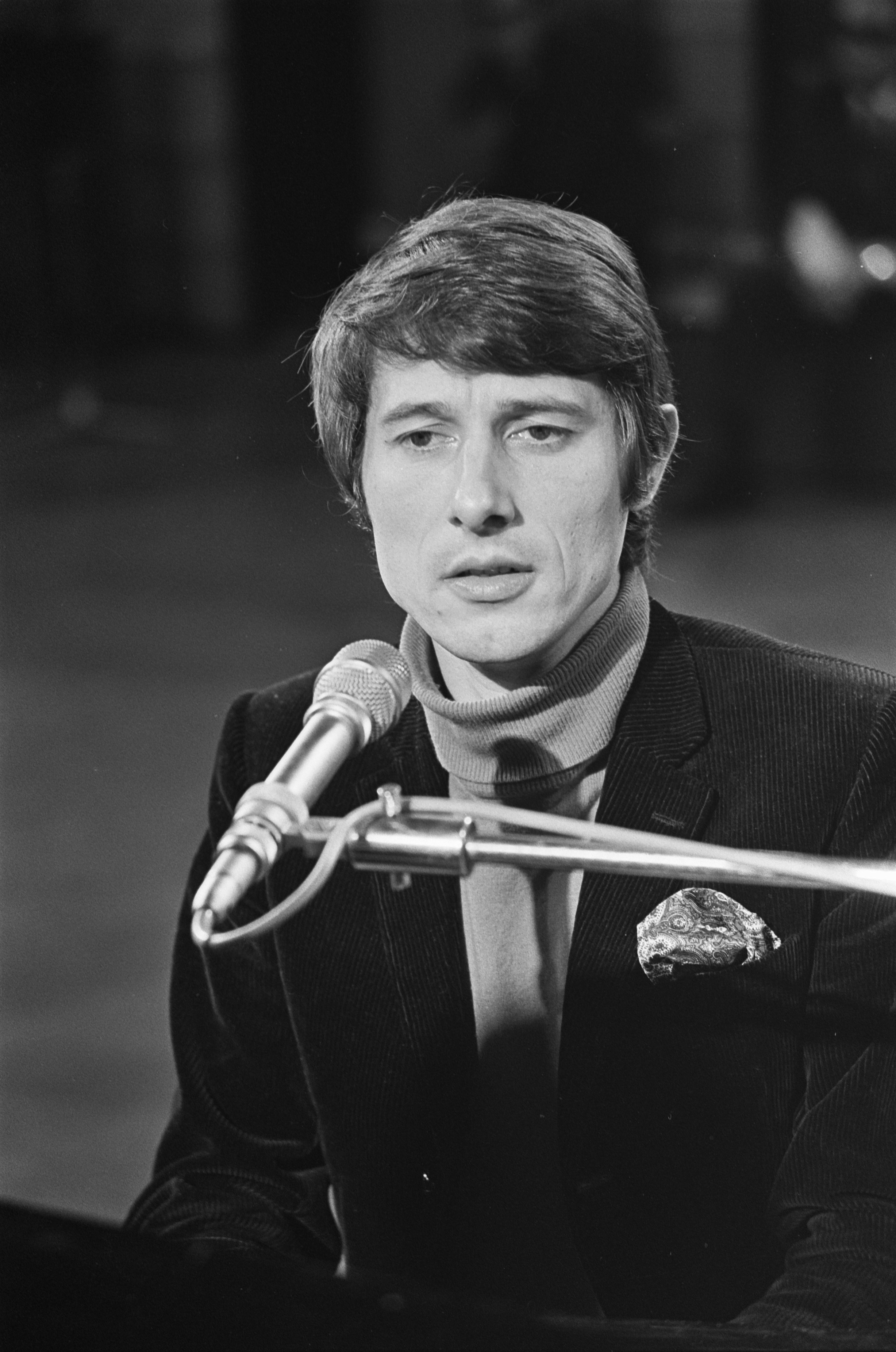 Collectie / Archief : Fotocollectie Anefo Reportage / Serie : Grand Gala du Disque 1968 Beschrijving : Grand Gala du Disque in de RAI. Udo Jürgens Datum : 7 maart 1968 Locatie : Amsterdam Trefwoorden : muziek, portretten, zangers Persoonsnaam : Jurgens Udo Fotograaf : Nijs, Jac. de / Anefo Auteursrechthebbende : Nationaal Archief Materiaalsoort : Negatief (zwart/wit) Nummer archiefinventaris : bekijk toegang 2.24.01.05 Bestanddeelnummer : 921-1456 Reacties Geplaatst door Maaike op 07 maart 2014 - 18:35. Locatie: RAI-congrescentrum